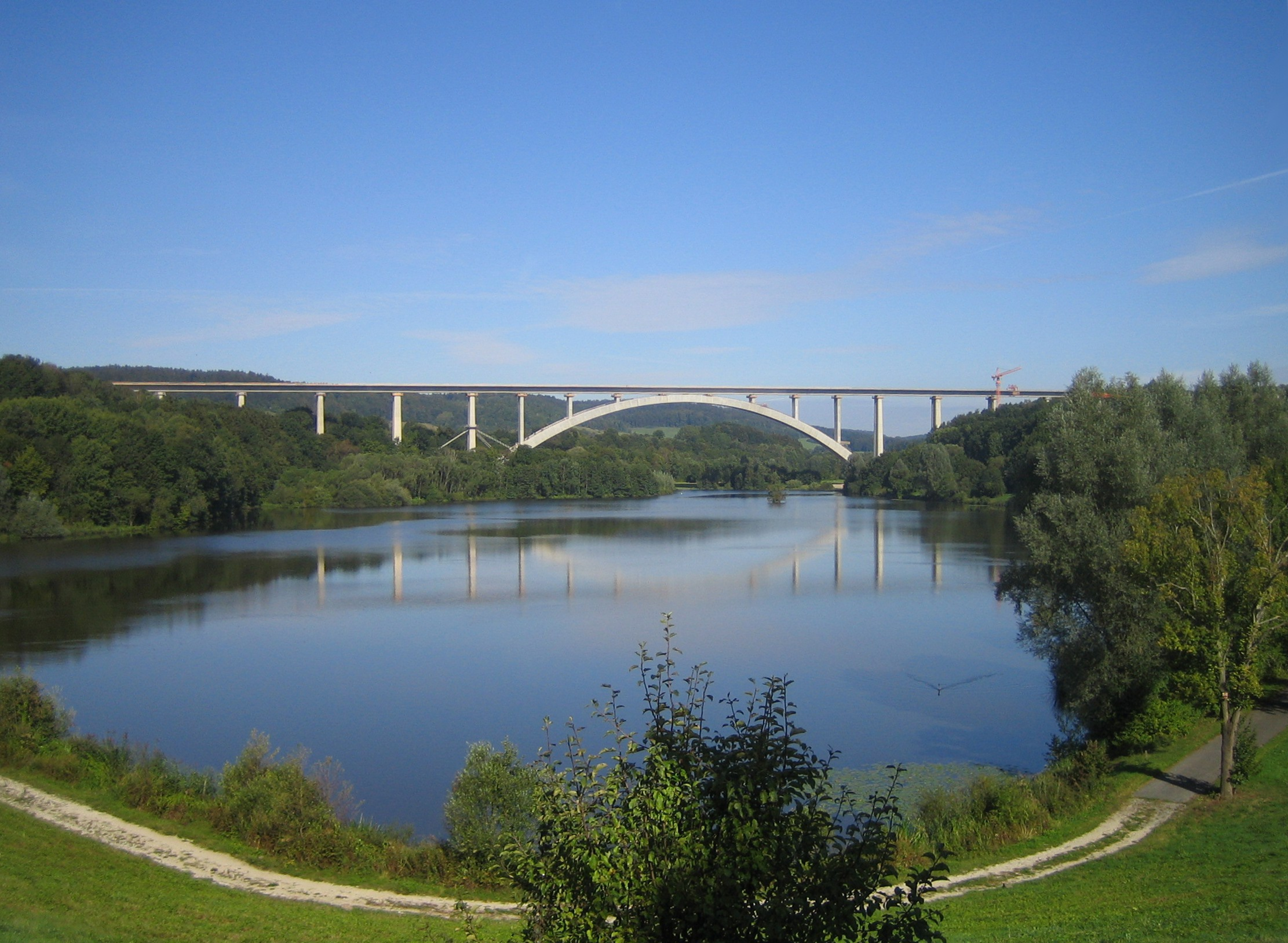 Die Talbrücke Froschgrundsee am Vormittag des 30.8.2009 vom Damm des Froschgrundsees aus.